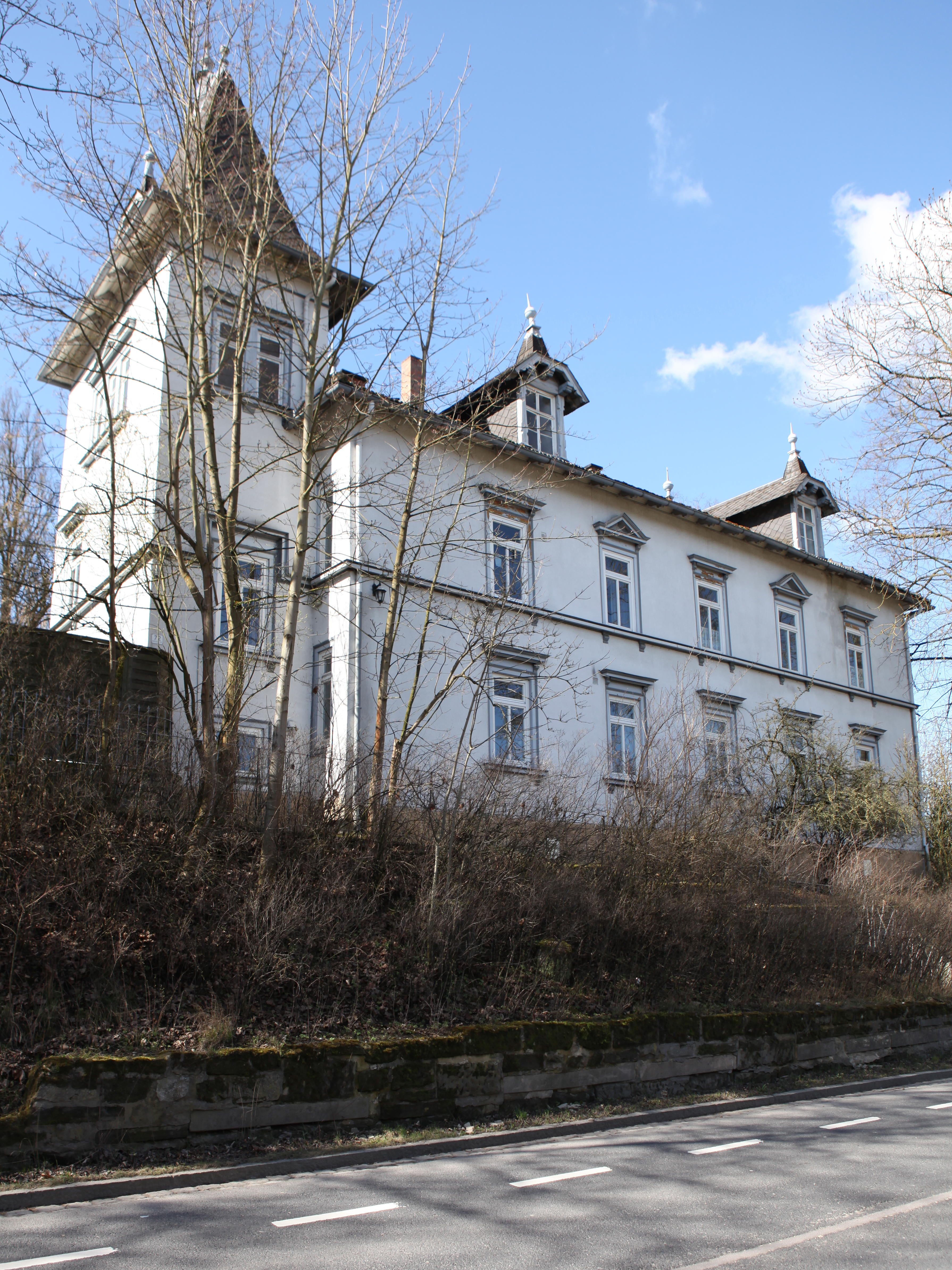 Neues Schloss (um 1880) in Unterlauter (OT von Lautertal) Landkreis Coburg